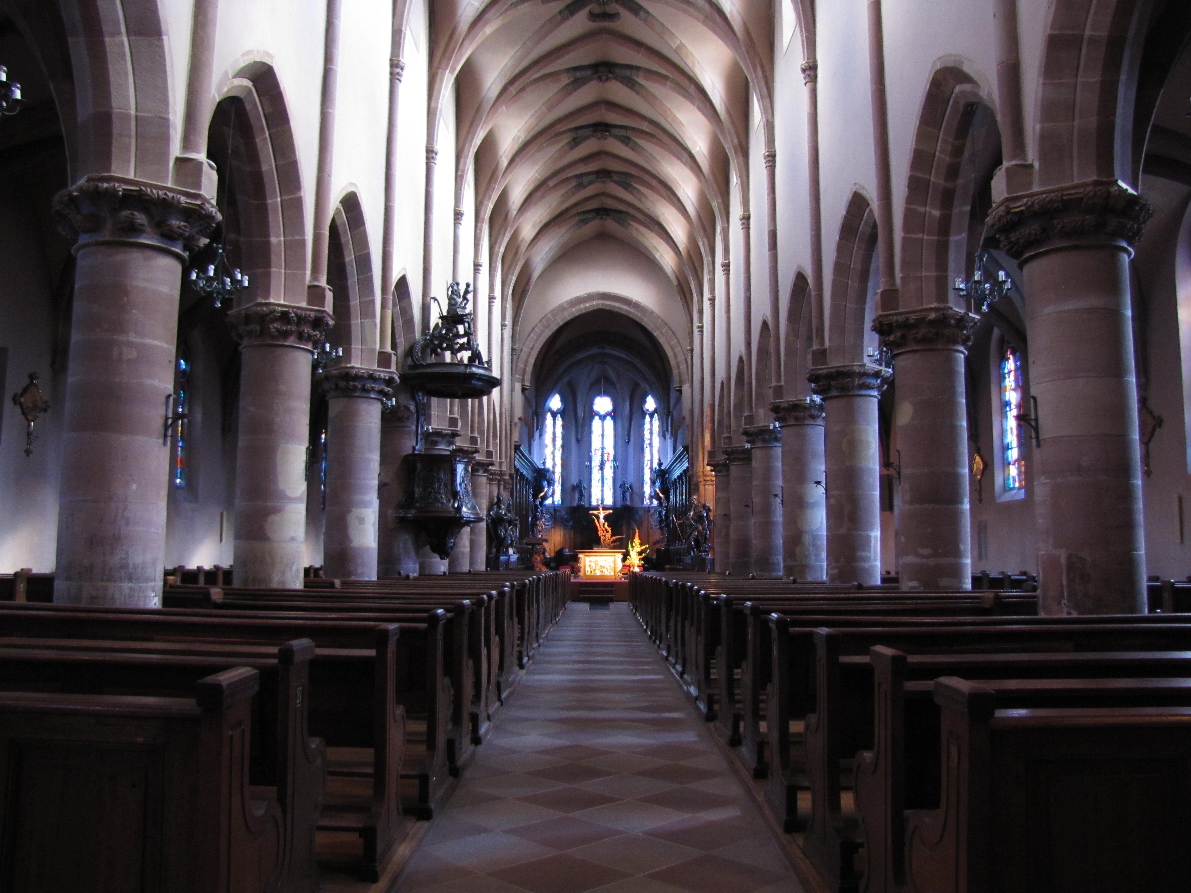 Alsace, Bas-Rhin, Église Saint-Nicolas de Haguenau, (Ancienne église du Couvent des Prémontrés) (PA00084725, IA00061903). Vue intérieure de la nef.